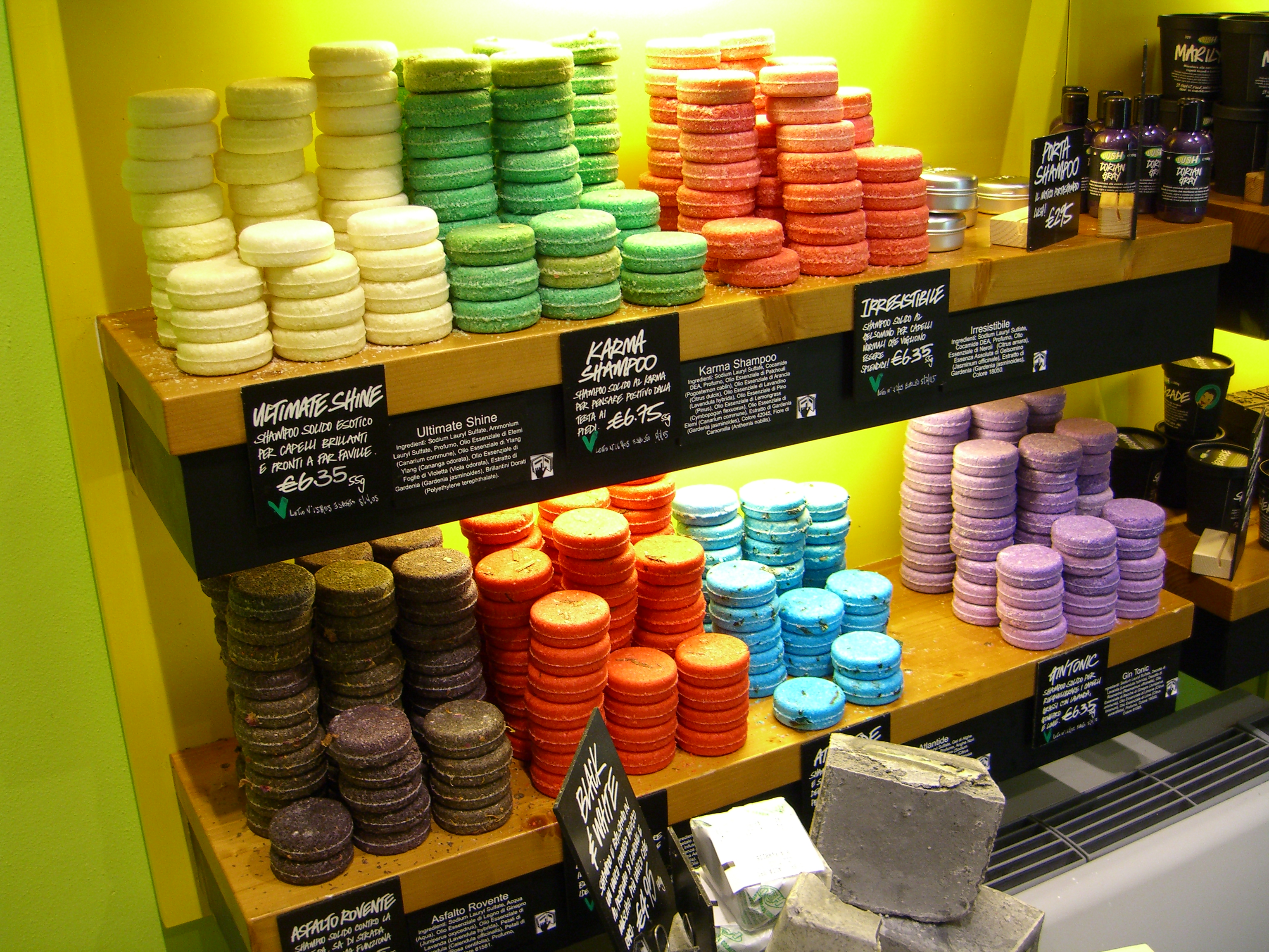 Lush